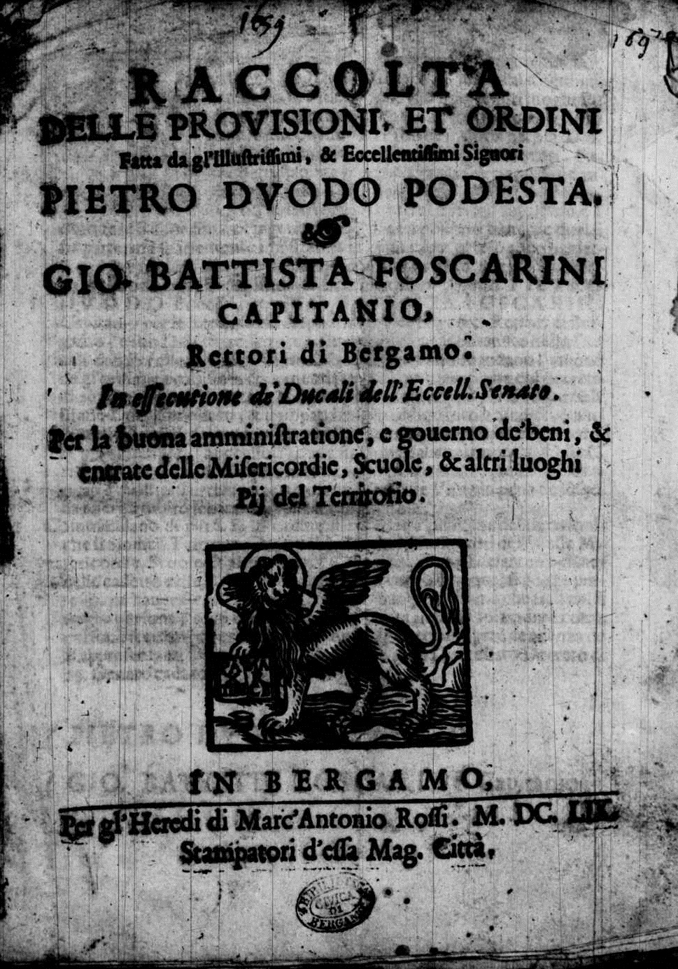 Frontespizio